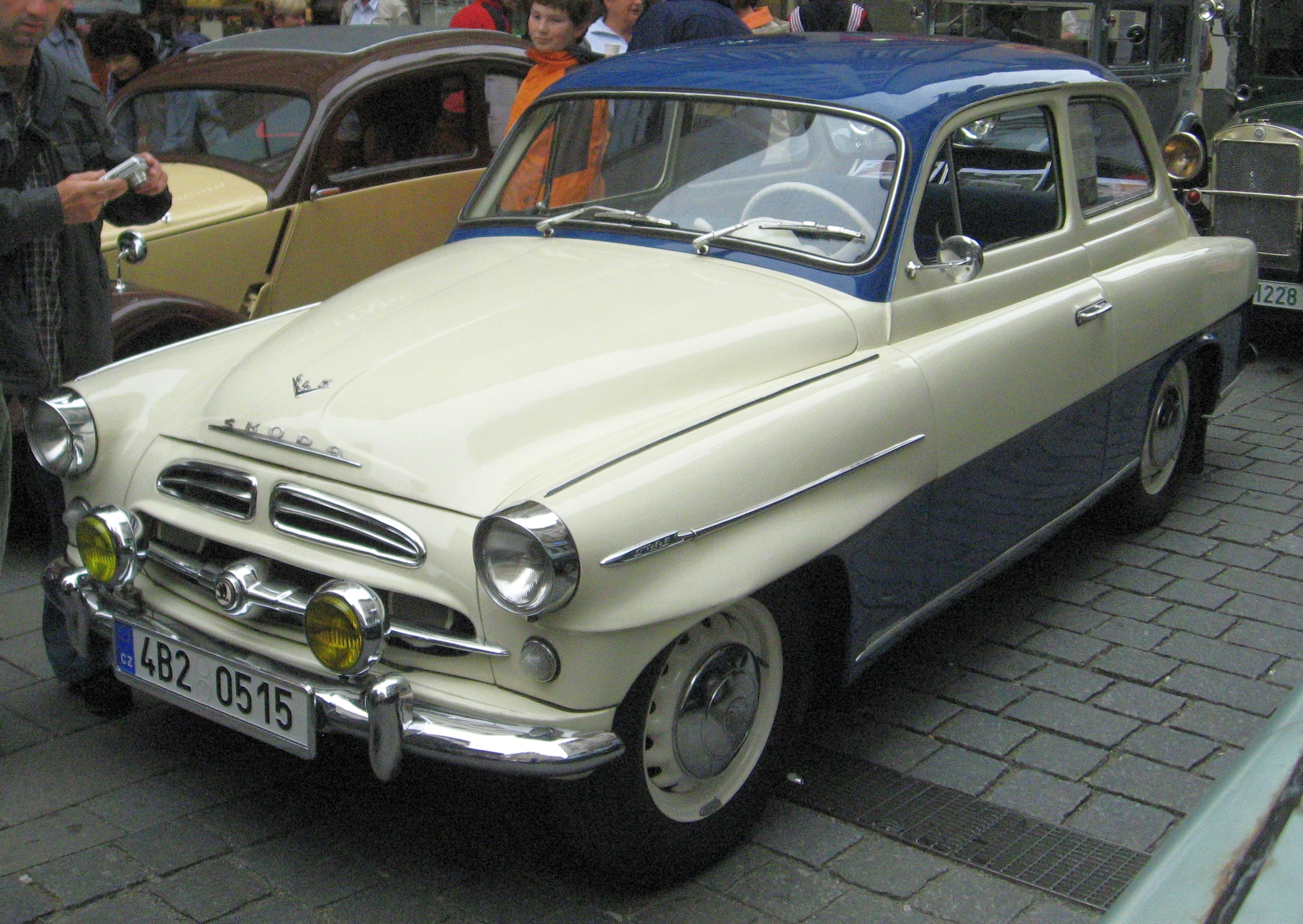 Škoda 445 u náměstí Svobody v Brně.